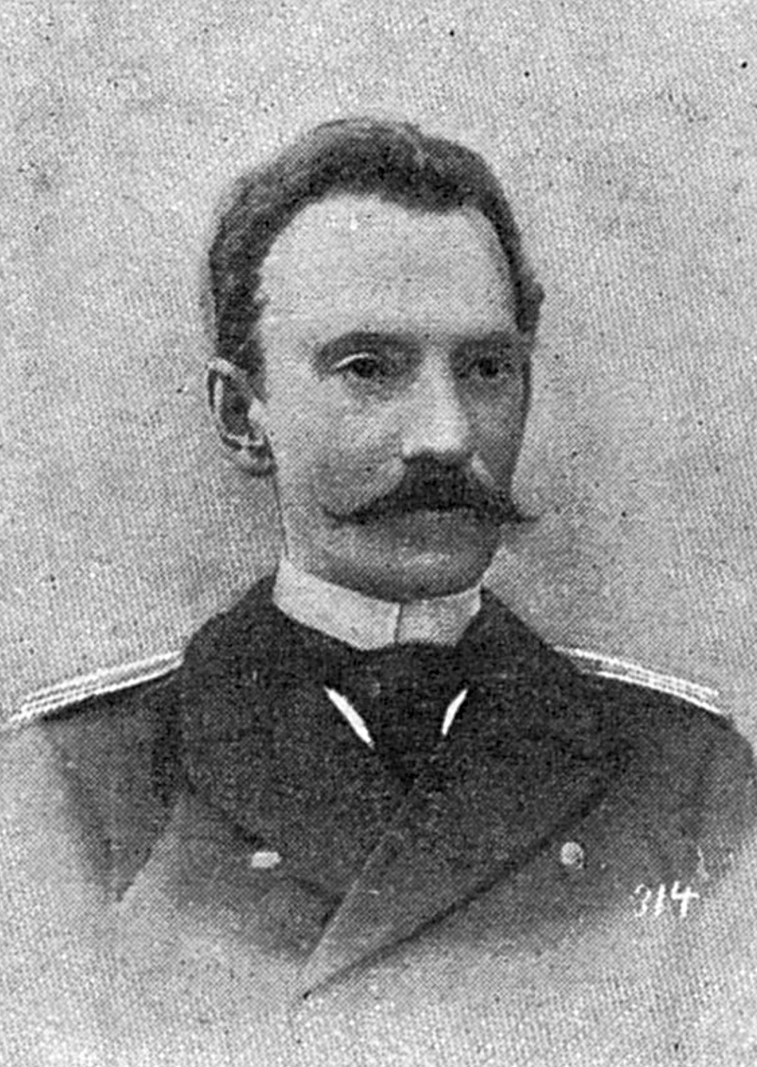 Гиляровский, Ипполит Иванович